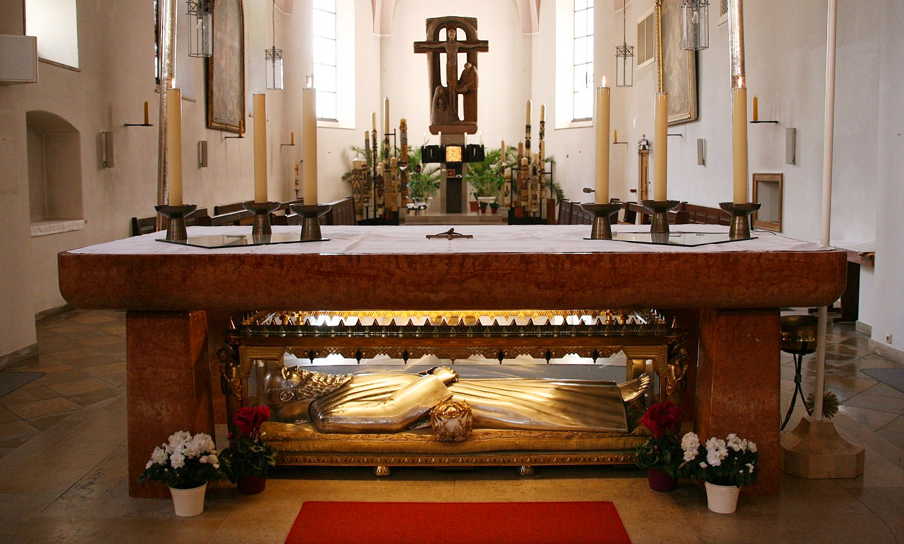 Reliquienschrein des Heiligen Konrad von Parzham in der Bruder Konrad-Kirche Altötting (Landkreis Altötting, Oberbayern). Silberner Schrein unter dem Zelebrationsaltar.